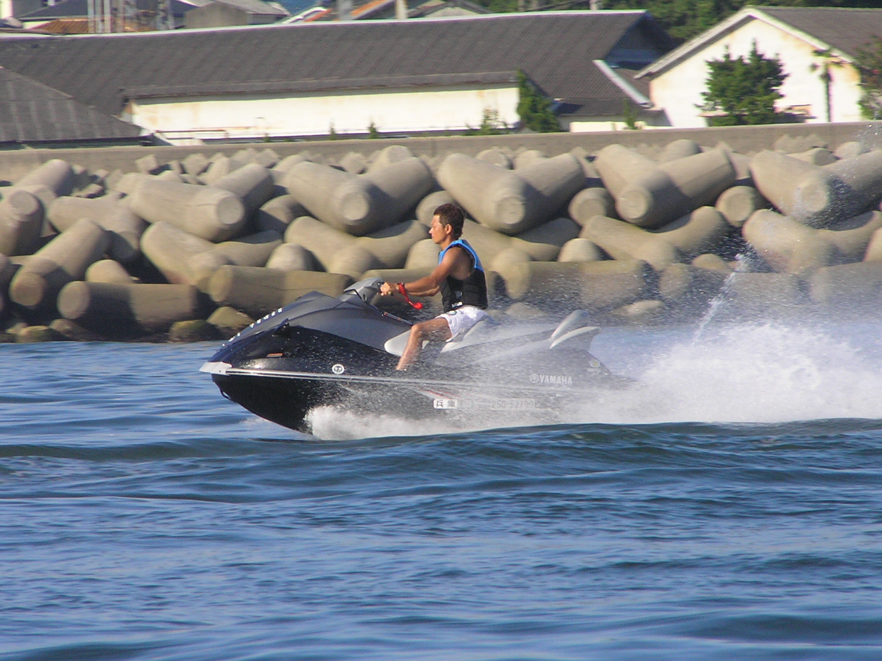 ジェット・スキー 東二見海岸。